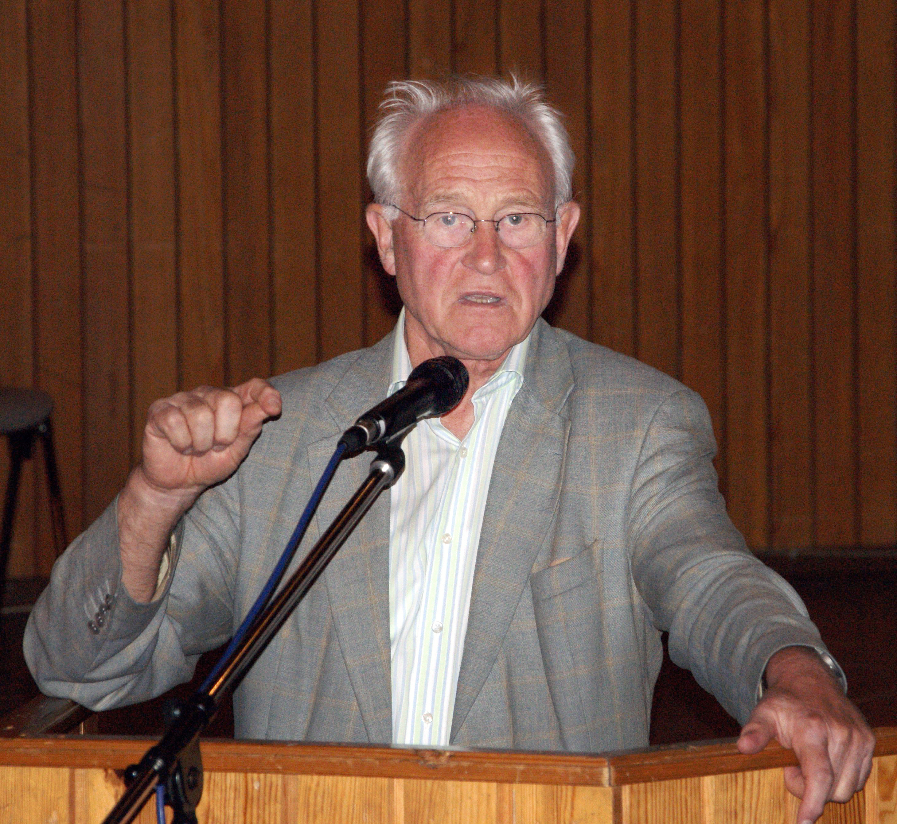 Friedhelm Hengsbach, visit at the CJD Christophorusschule Königswinter